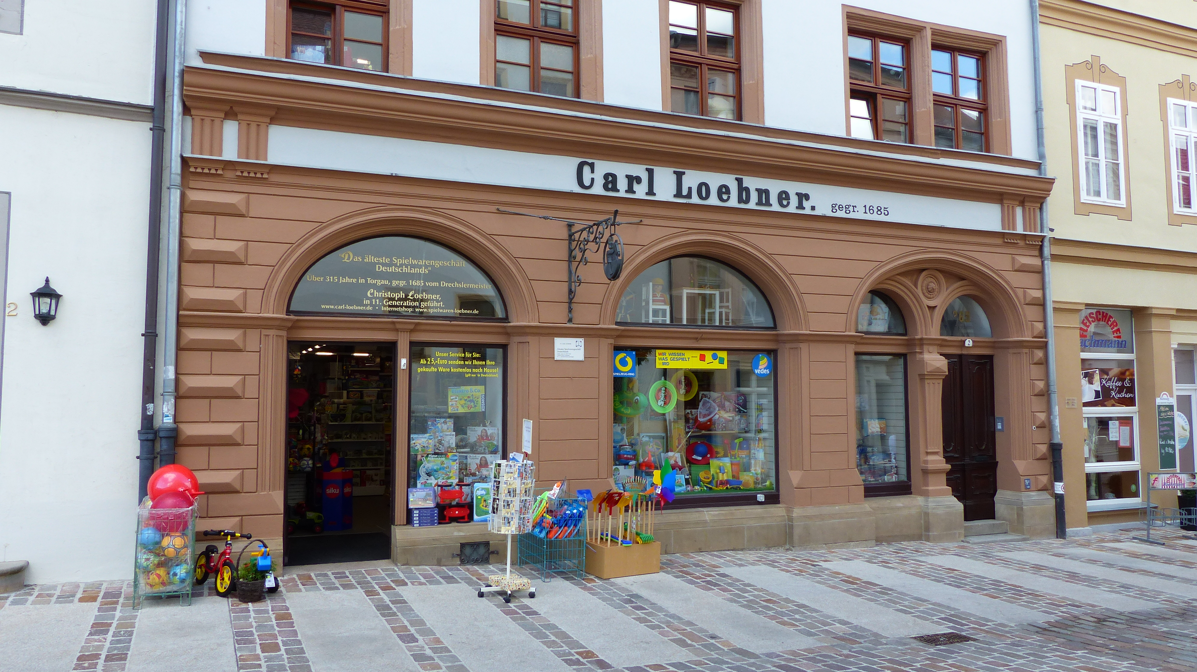 Denkmalgeschütztes Haus, Bäckerstraße 2, Torgau, ältestes Spielwarengeschäft, Spielwaren Carl Loebner